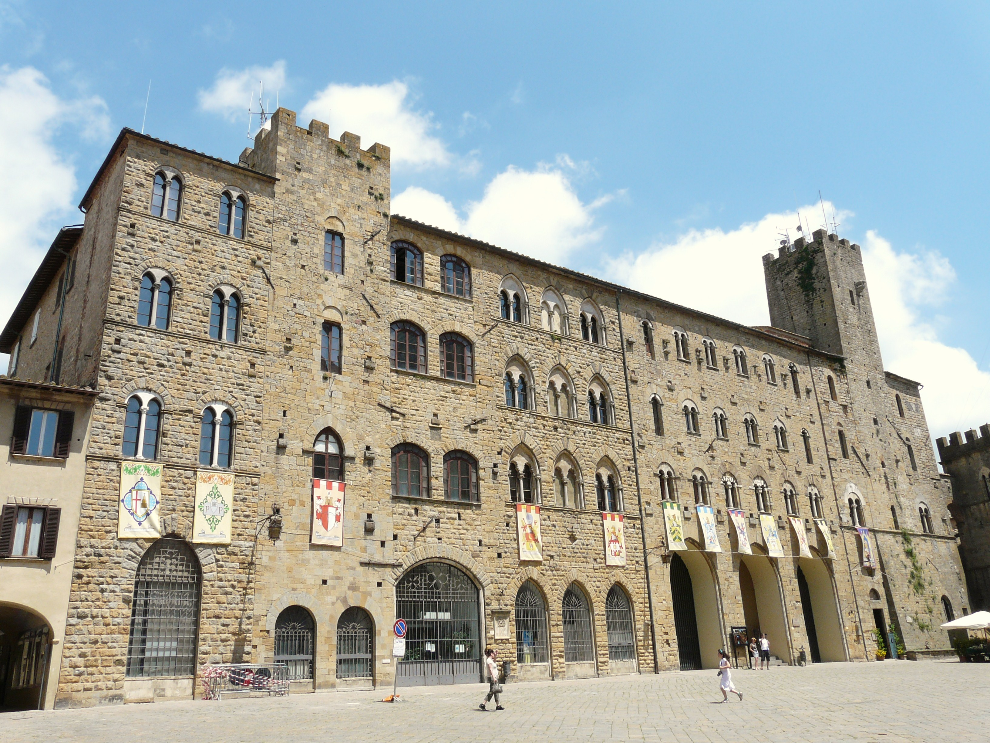 Piazza dei Priori, Volterra, Toscana, Italia